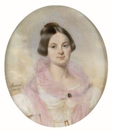 Марианна Мостовская, ур. Потоцкая (1780—1837)